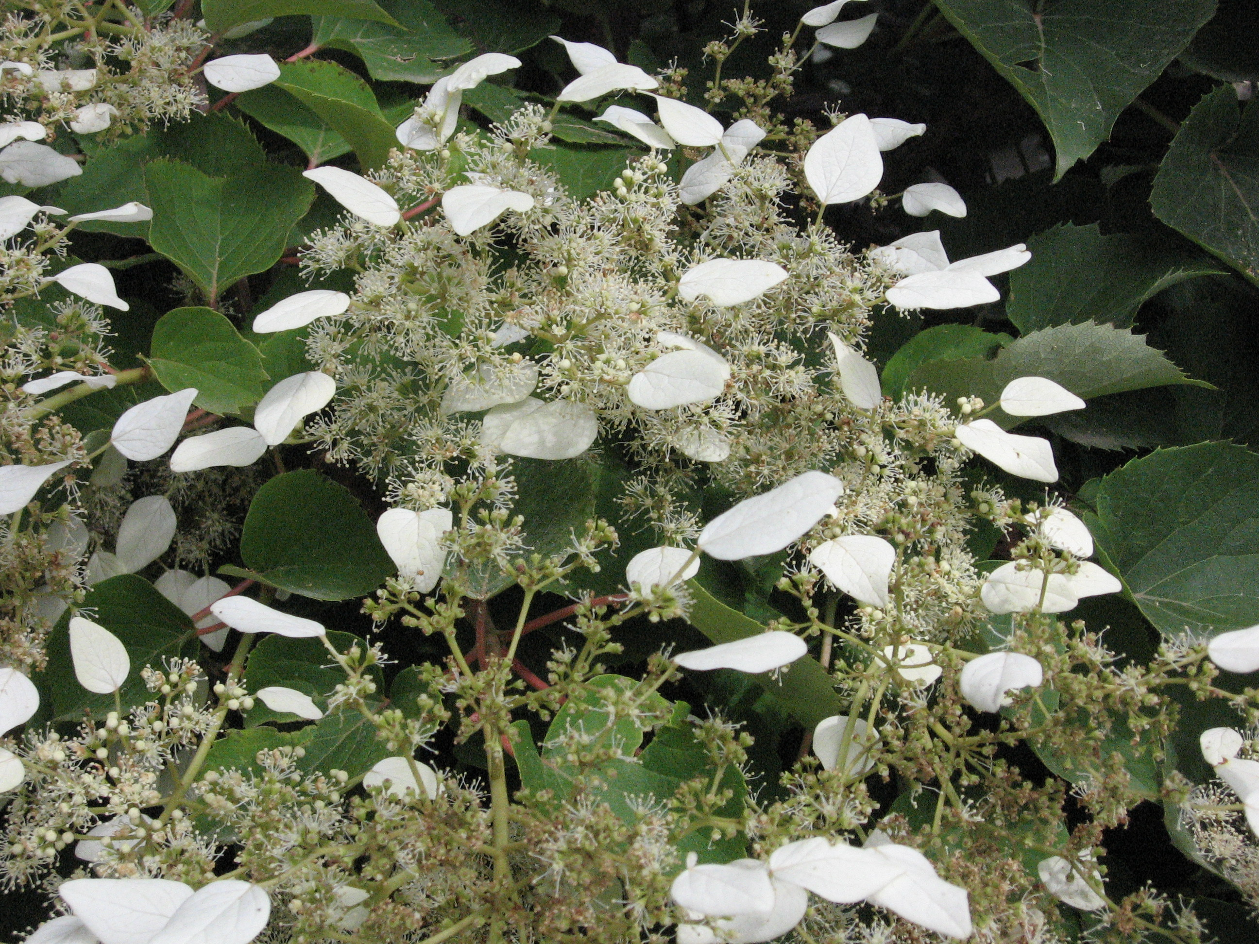 Schizophragma hydrangeoides. Real Jardín Botánico, Madrid.